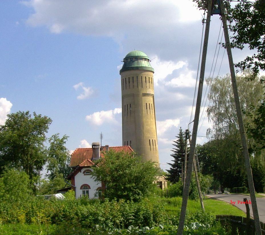 Sępopol - wieża ciśnień (zabytek nr rejestr. A-2073)